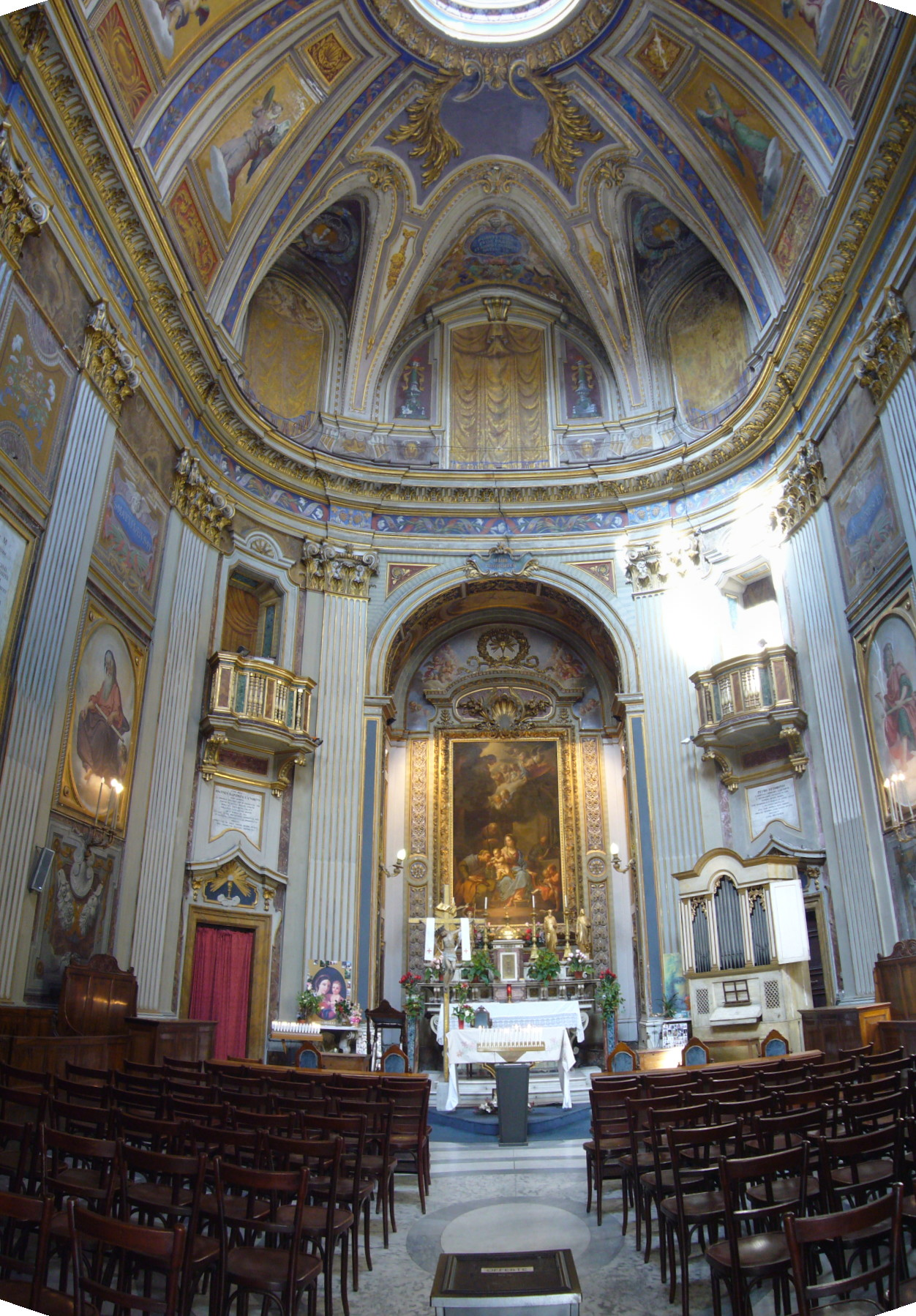 Roma, oratorio del ss. Sacramento, interno